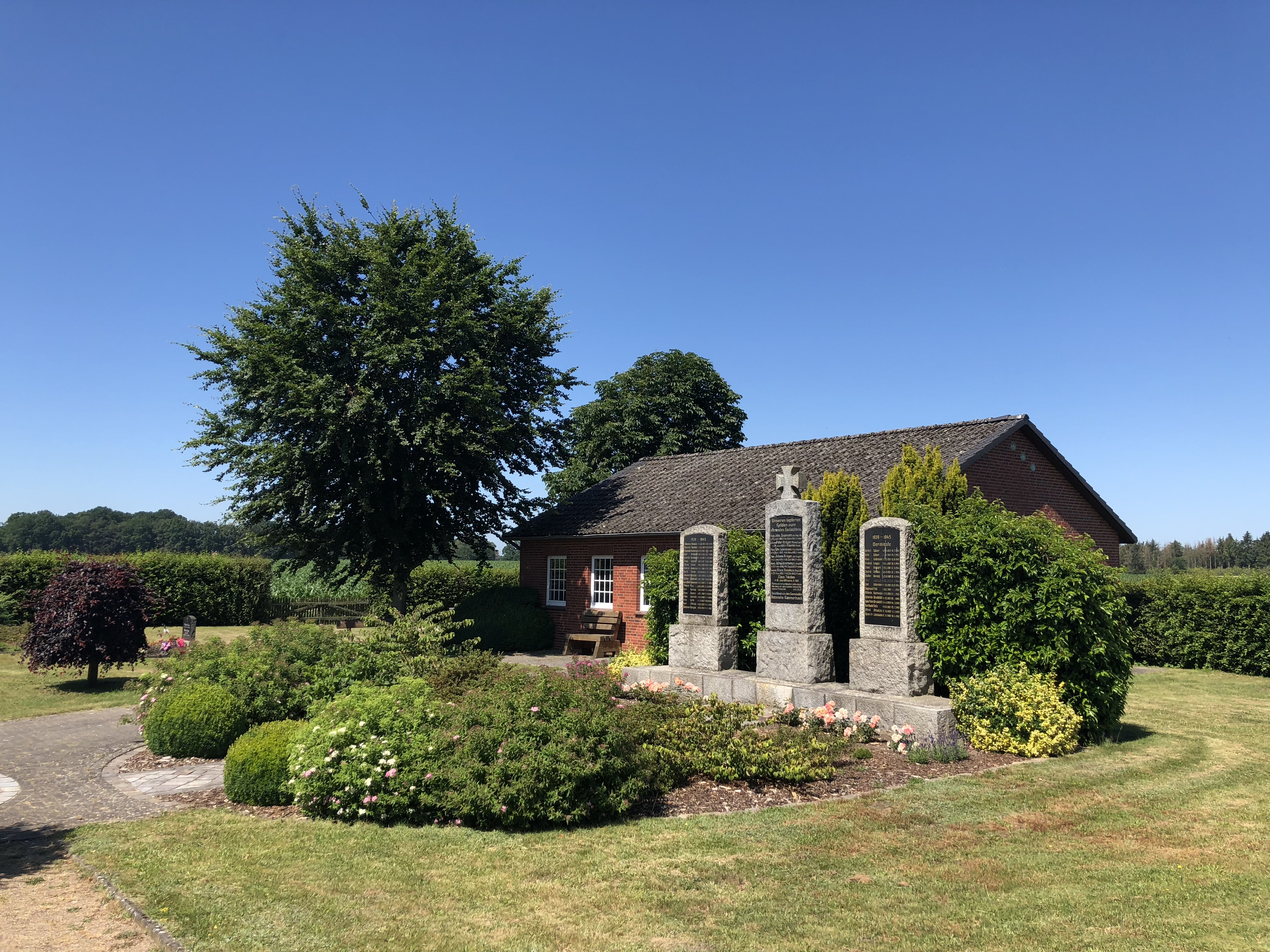 Kriegerdenkmaal op’n Karkhoff in Remnoh-Kommerbusch